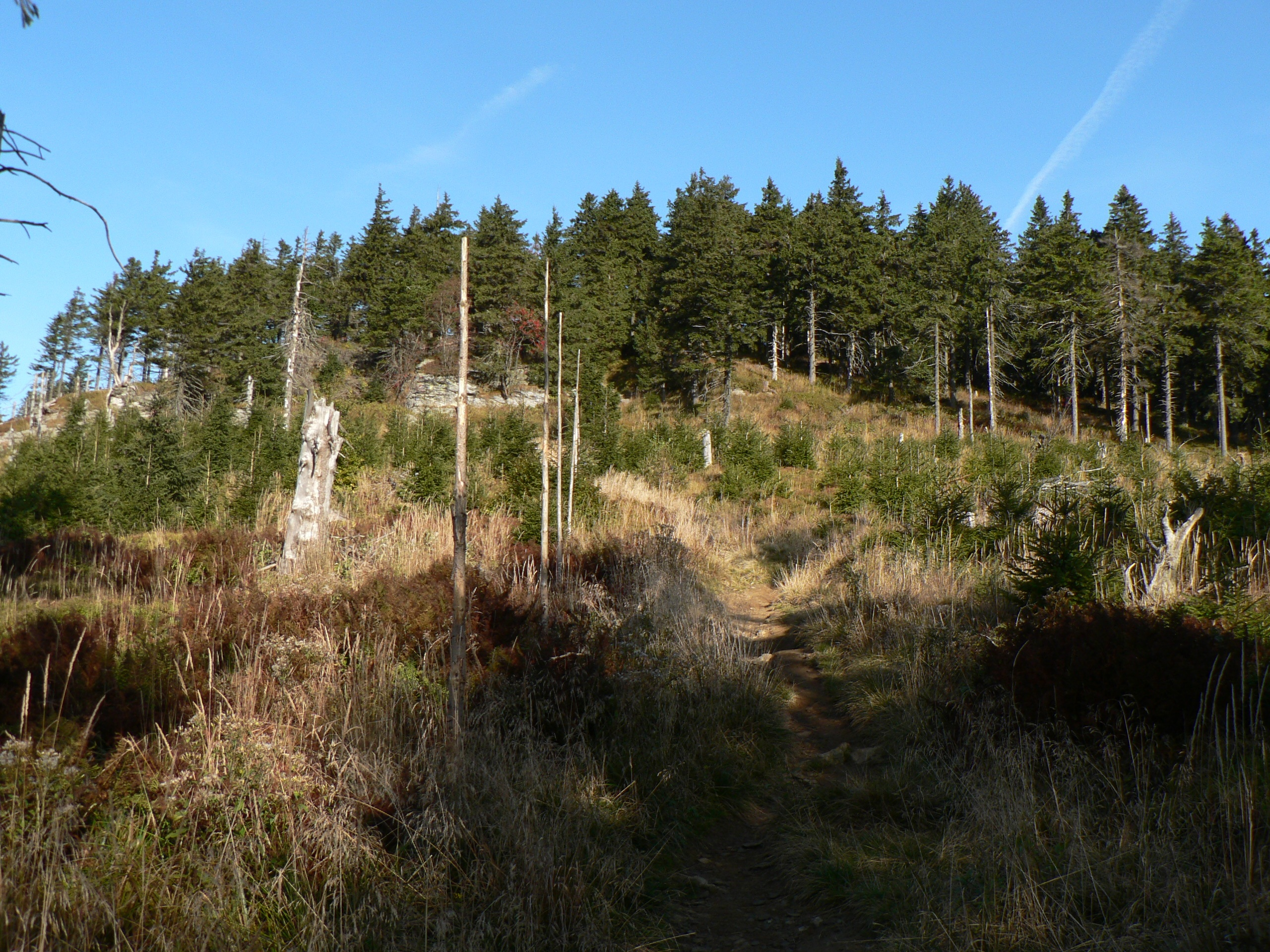 Pohled na vrchol Výrovky od jihu